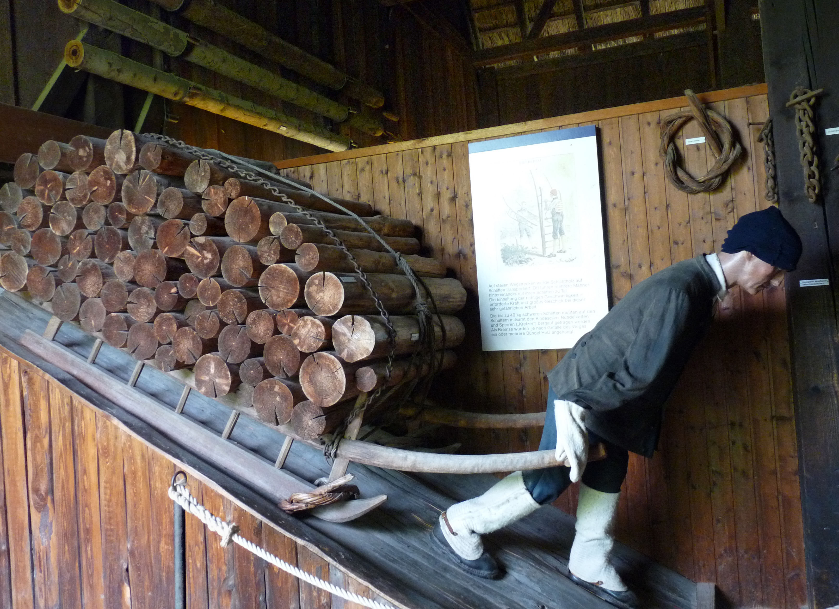 Un schlitteur en action. Reconstitution au musée en plein air Vogtsbauernhof (Gutach, Forêt-Noire)